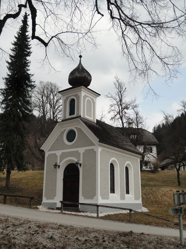 Messkapelle in der Gemeinde Mitterberg, steht unter Denkmalschutz.